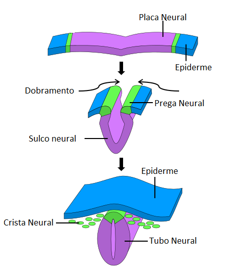 Neurulação em anfíbios e ammiotas. Neste processo, a ectoderme se dobra no ponto mais dorsal fazendo com que as pregas neurais se encontrem, formando assim, a epiderme externa (em azul) e o tubo neural (em roxo) interno, entre eles se forma as cristas neurais (verde).